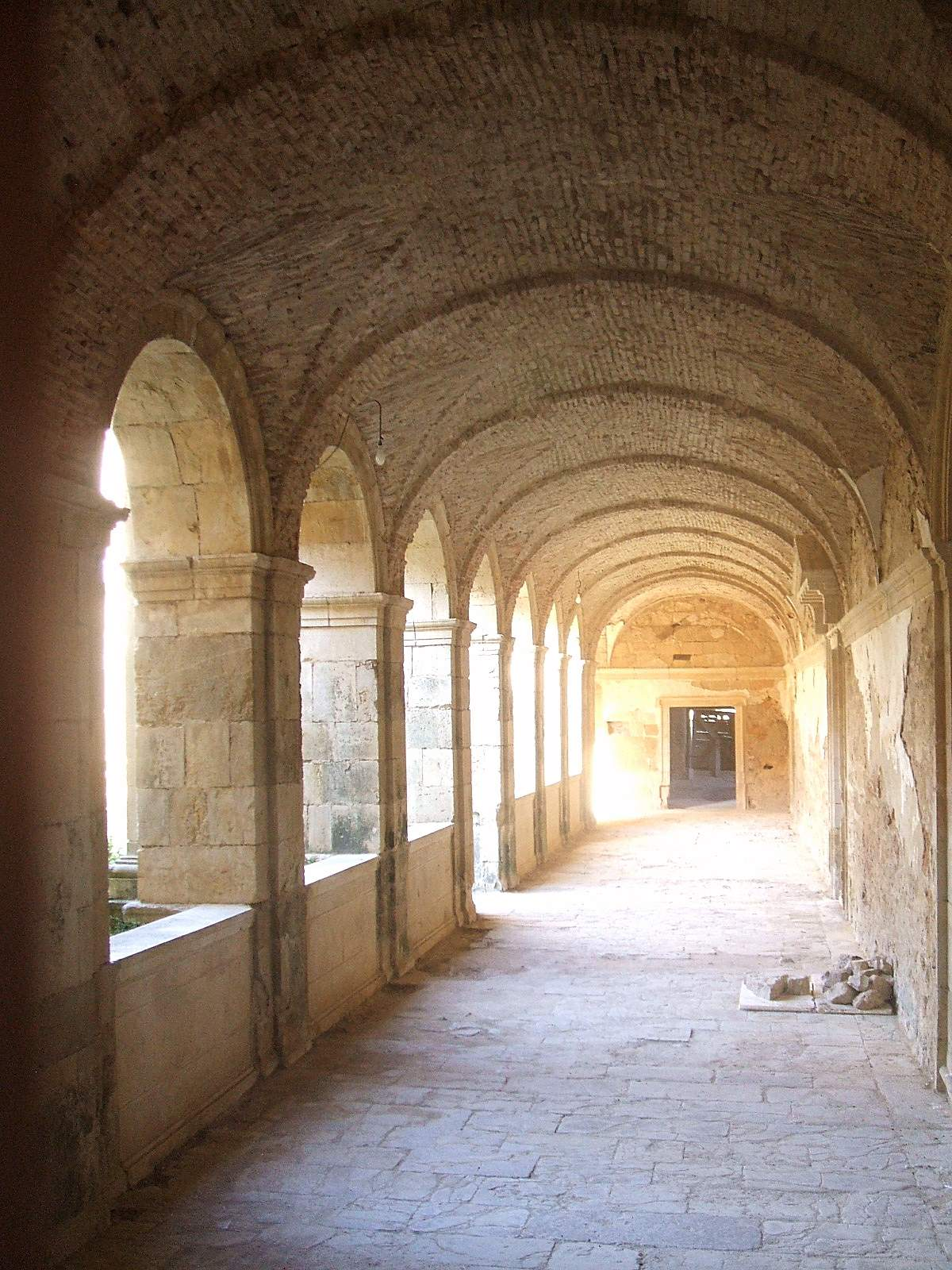 Claustro del Monasterio de Santa María de Sandoval, en Villaverde de Sandoval (León)